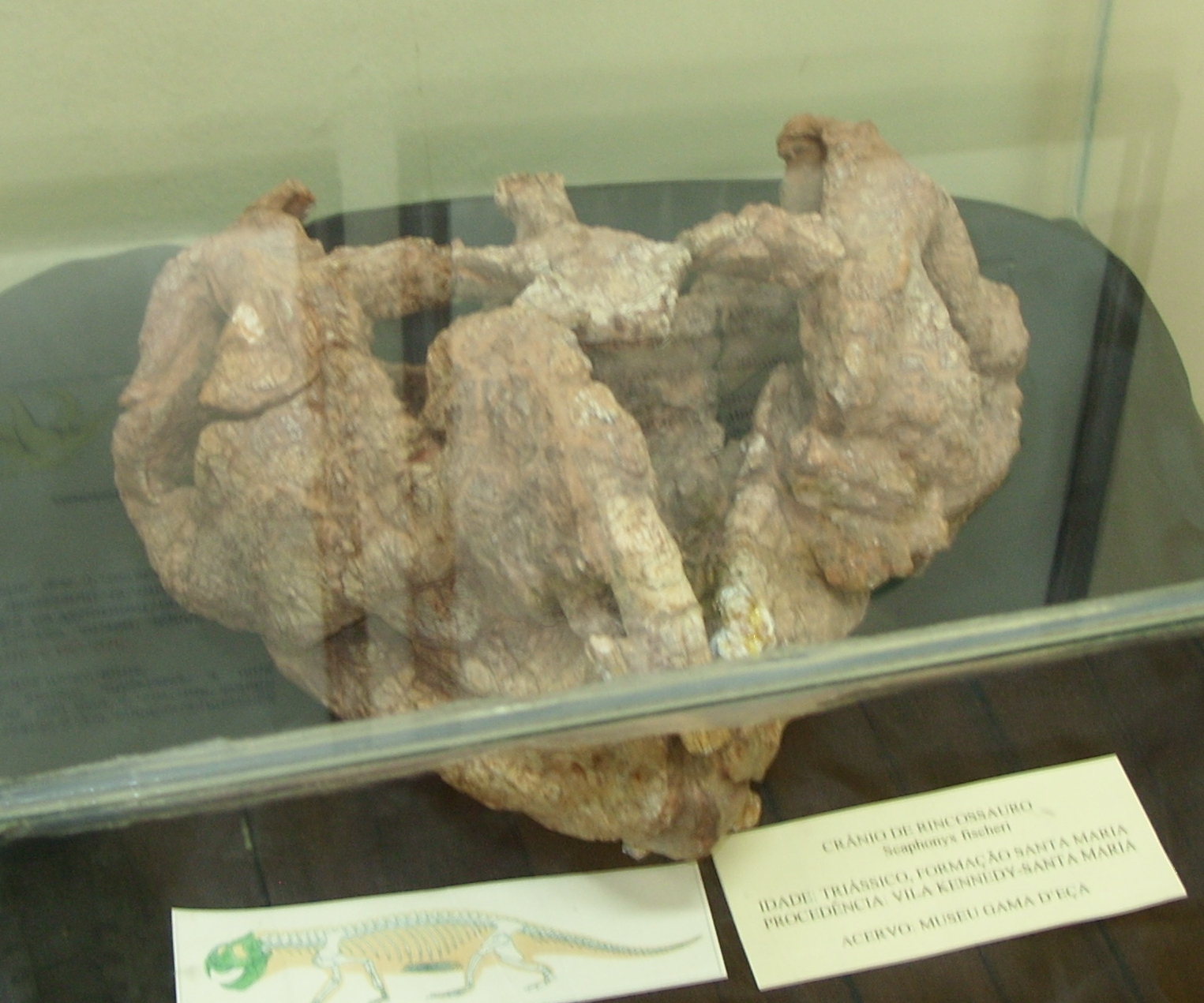 Crânio de Scaphonyx fischeri encontrado na Cidade de Santa Maria, Rio Grande do Sul, Brasil.